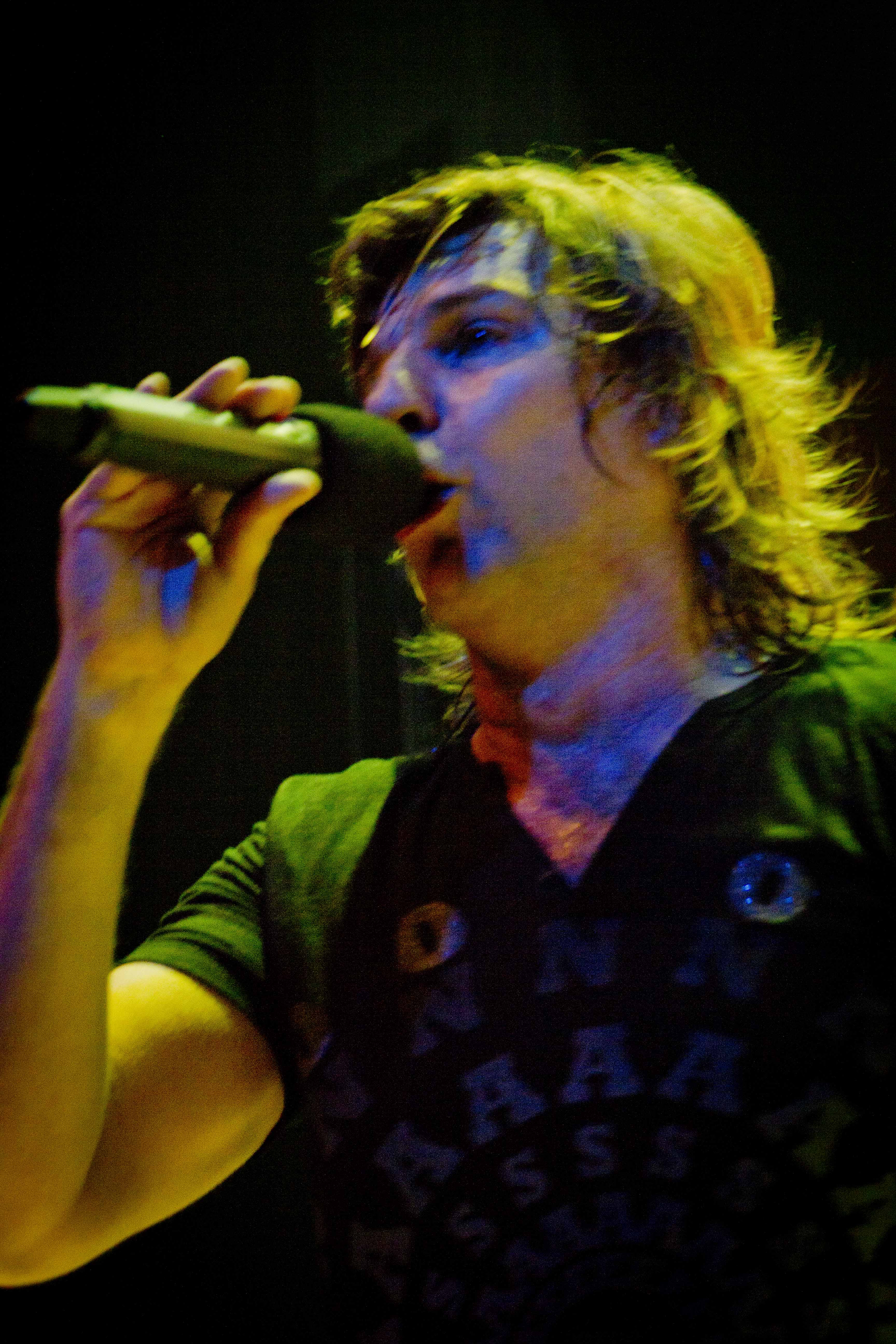 Mario "Pájaro" Gómez, cantante de Vilma Palma e Vampiros.